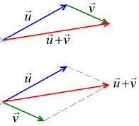 Construction géométrique de la somme de deux vecteurs.